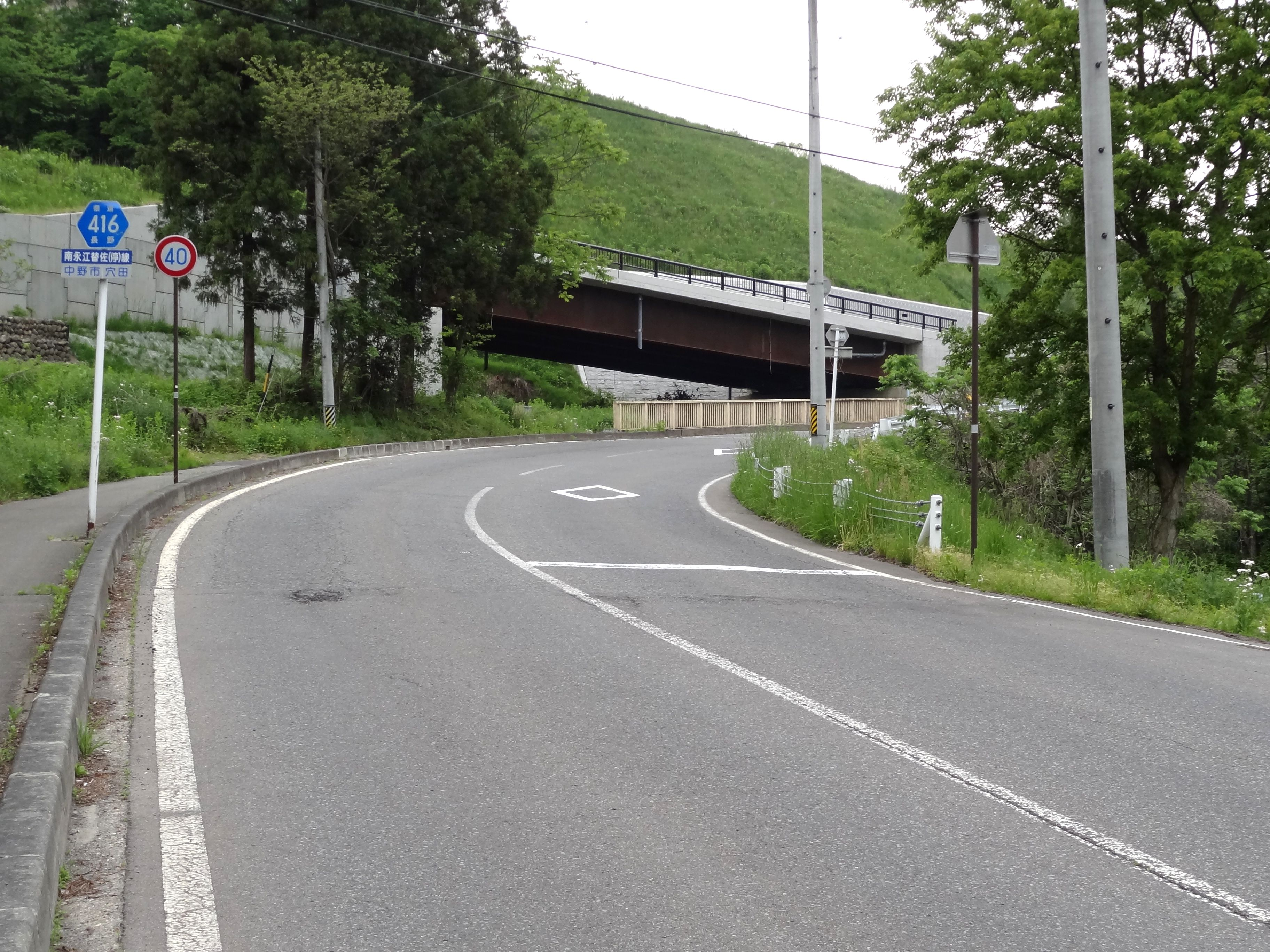 長野県道416号南永江替佐停車場線 中野市大字穴田付近